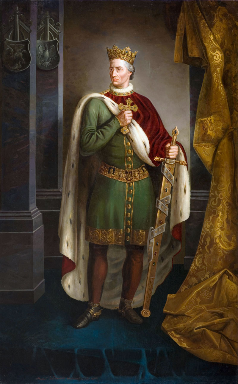 Беларуская (тарашкевіца): Партрэт вялікага князя літоўскага Ягайлы (Jagajła)